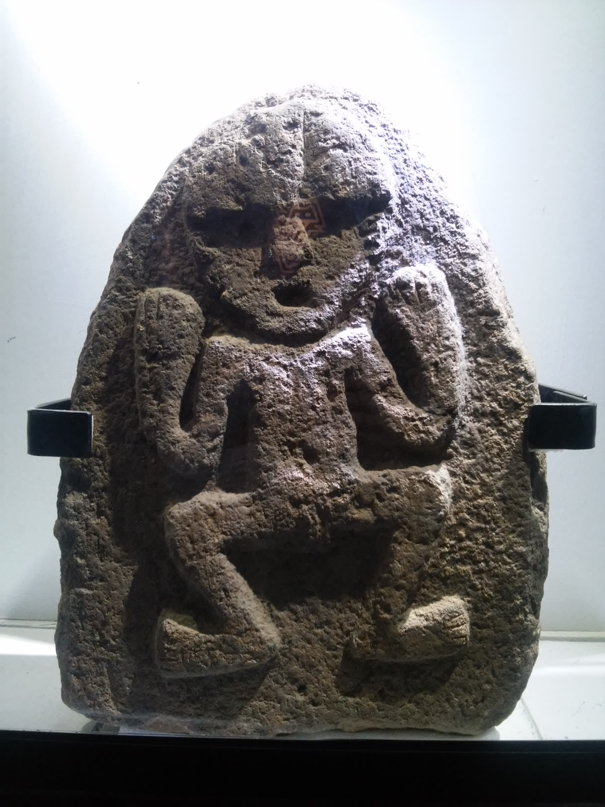 Foto tomada de una laja vertical de la cultura Recuay hallada en Cátac. Forma parte de la muestra permanente del Museo Arqueológico de Áncash ( julio de 2019).